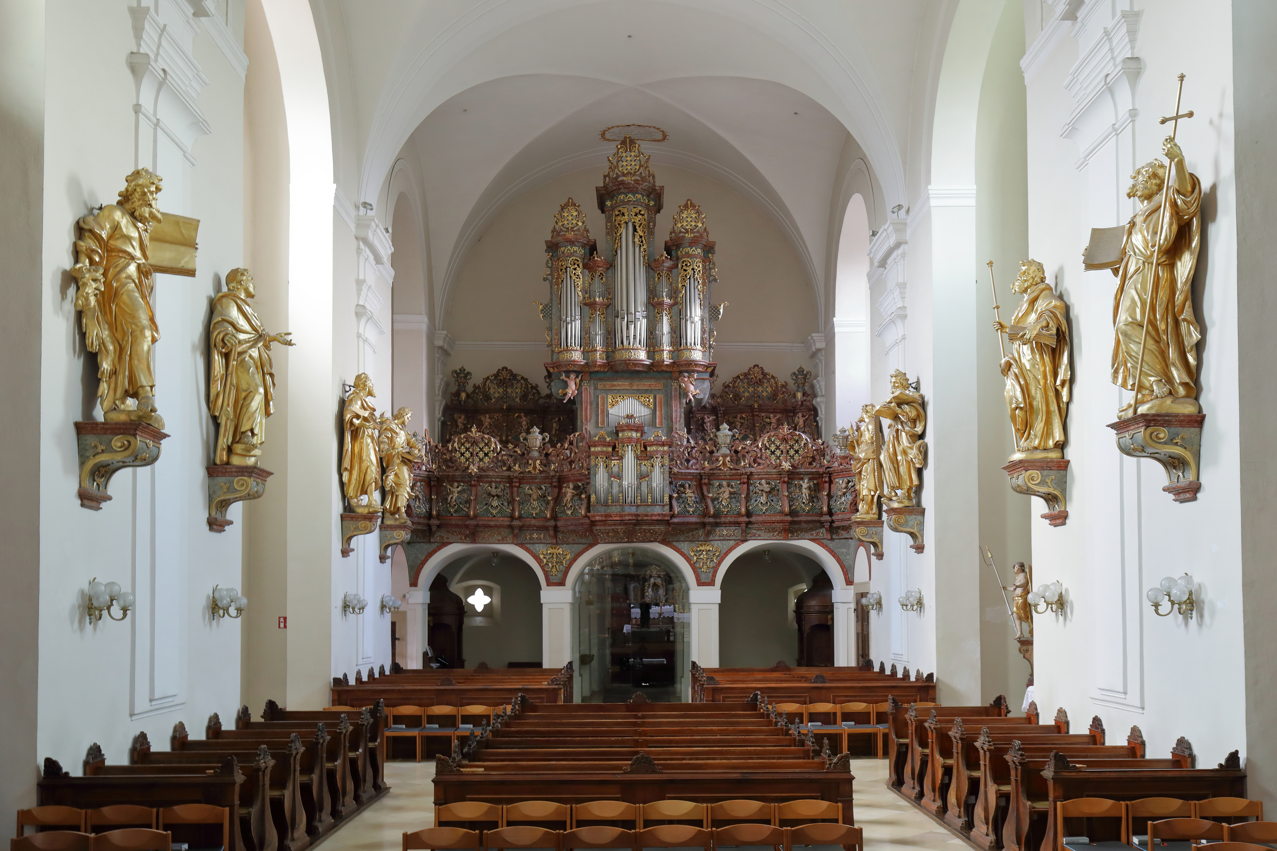 Blick zur Orgelempore in der Martinskirche in der niederösterreichischen Stadt Klosterneuburg.